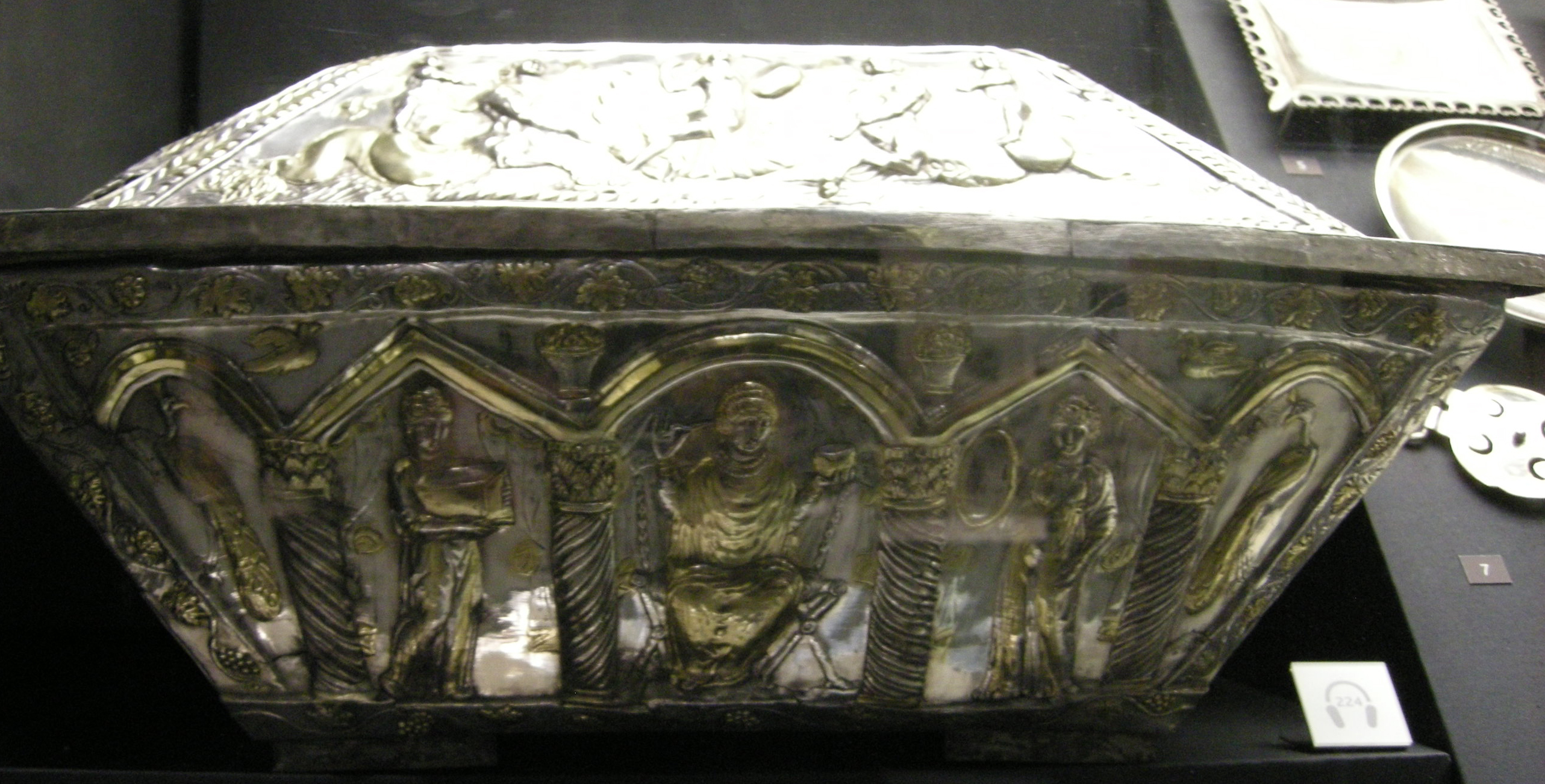 Arte tardoantica da roma, caschetto di projecta, 380 circa